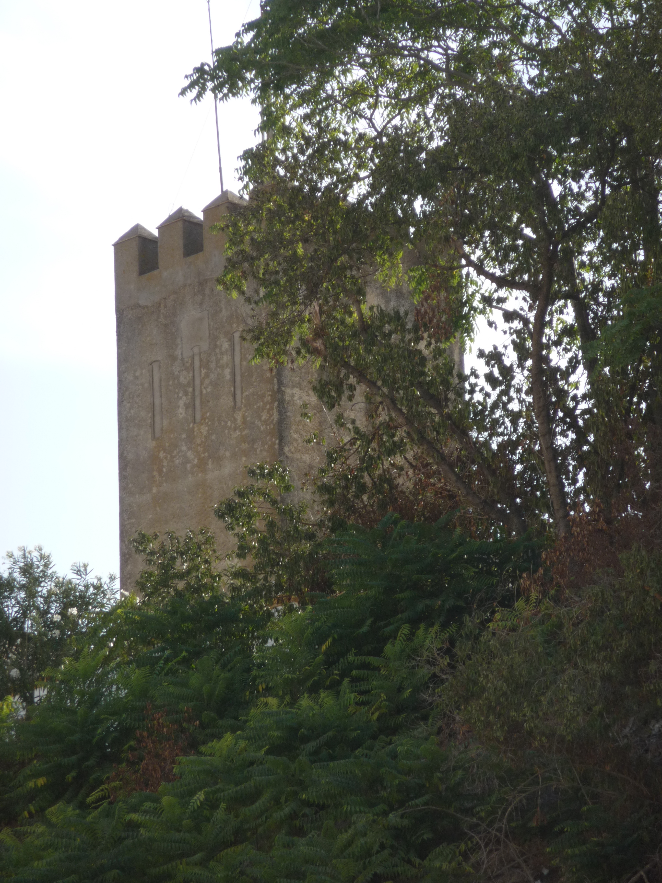 Castillo de San Pedro (Huelva, España) Reconstrucción de una de las torres presumíblemente sobre el solar original. Titularidad privada.